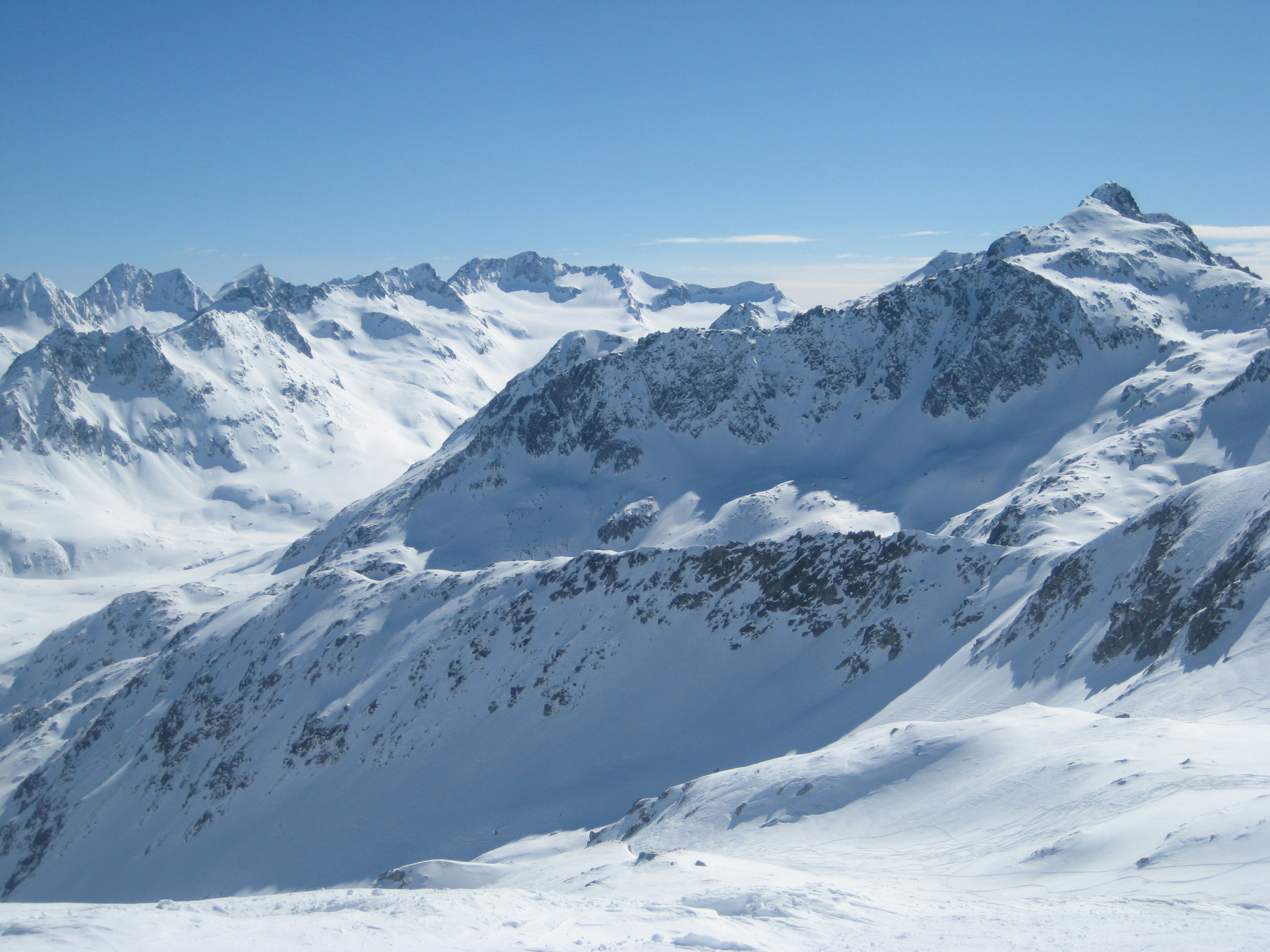 Piz Badus vom Pazolastock (2740 m) gesehen. Im Hintergrund Piz Ravetsch (3007 m) mit Maighelsergletscher. Links ganz hinten von links Piz Git (2968 m), Piz Uffiern (3013 m) und Piz Blas (3019 m).